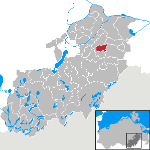 Kublank in Mecklenburg-Vorpommern, Landkreis Mecklenburg-Strelitz